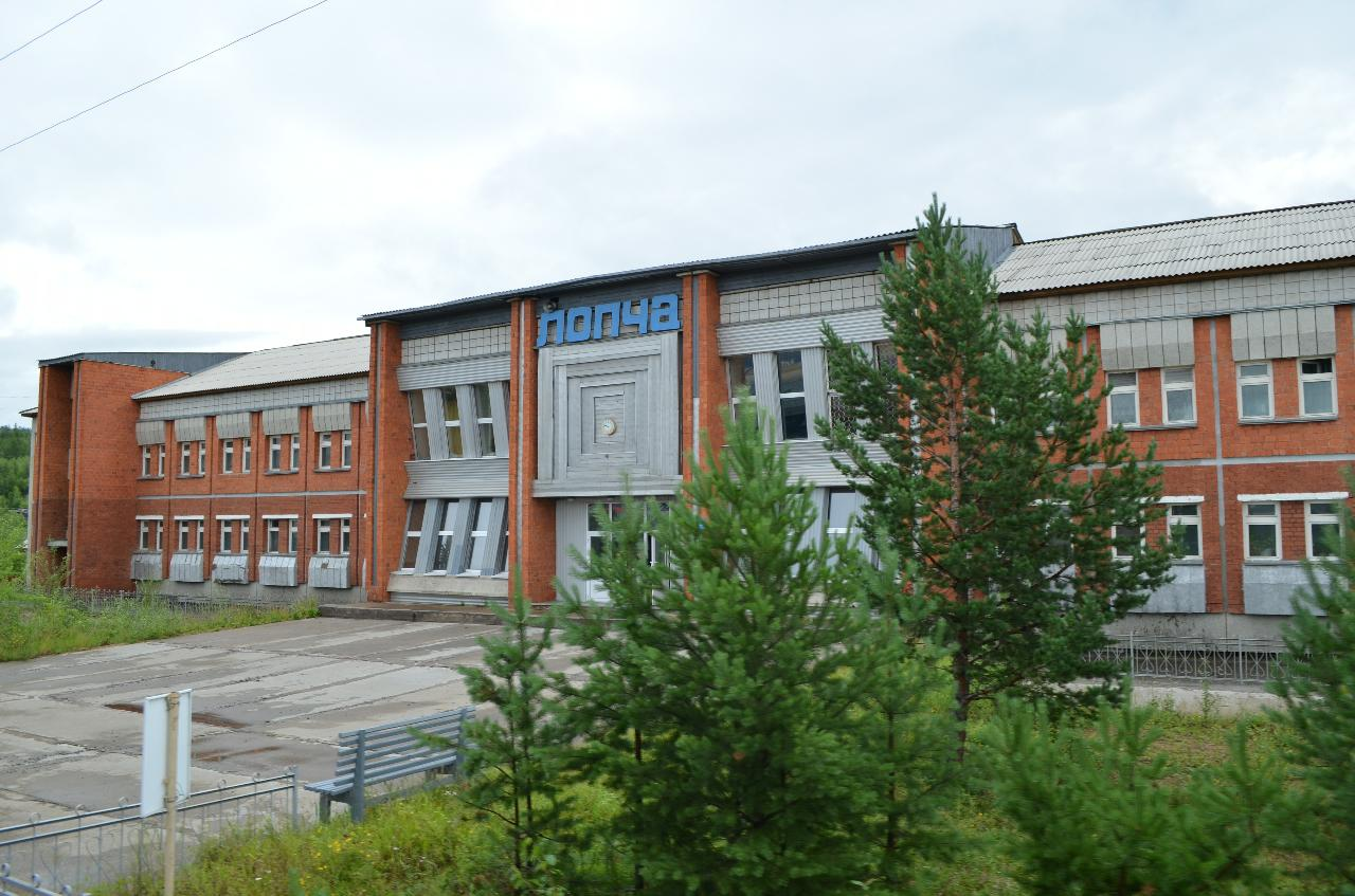 Железнодорожная станция Лопча, Амурская область